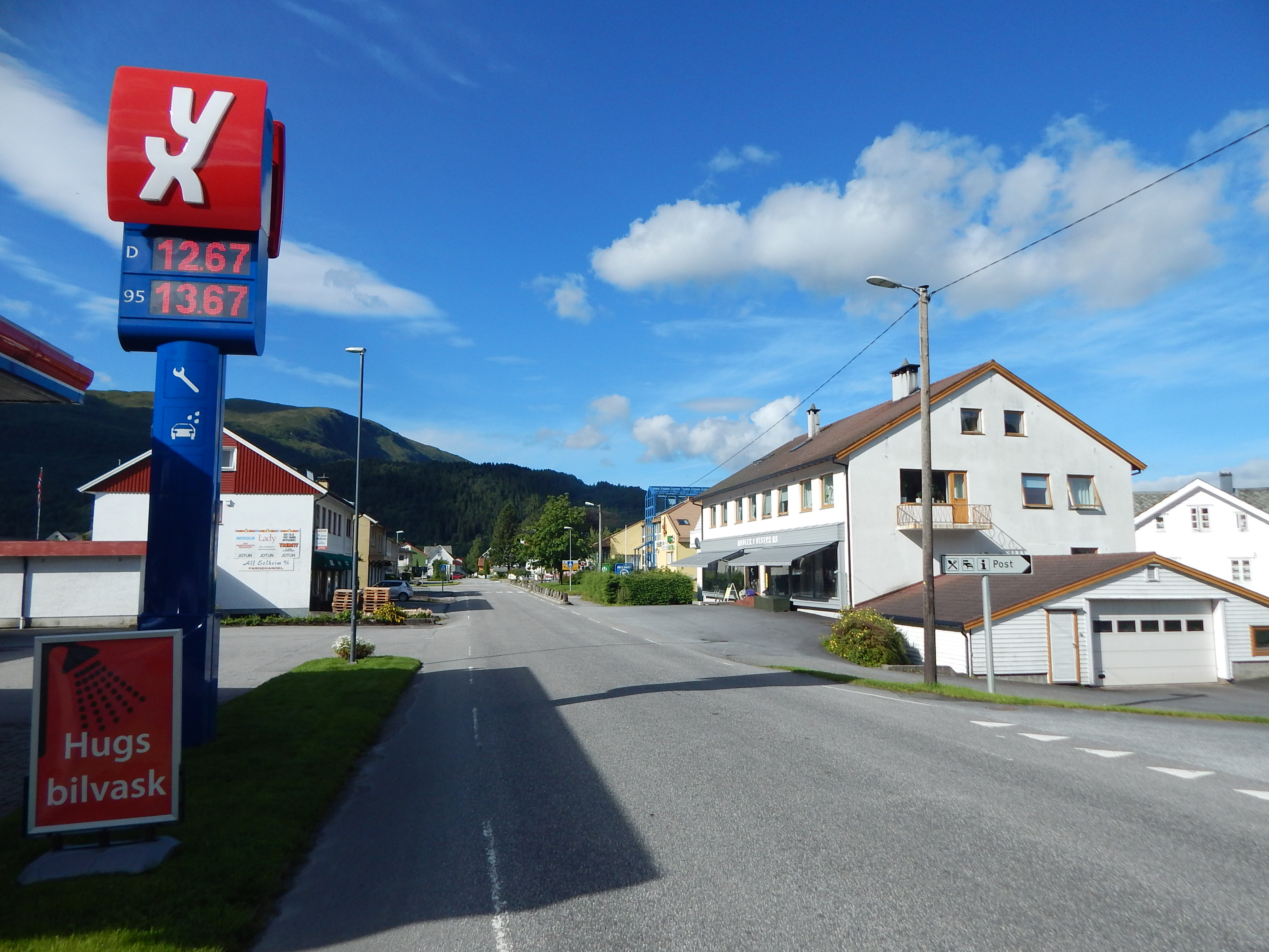 Primær fylkesvei 57 gjennom Dale i Fjaler